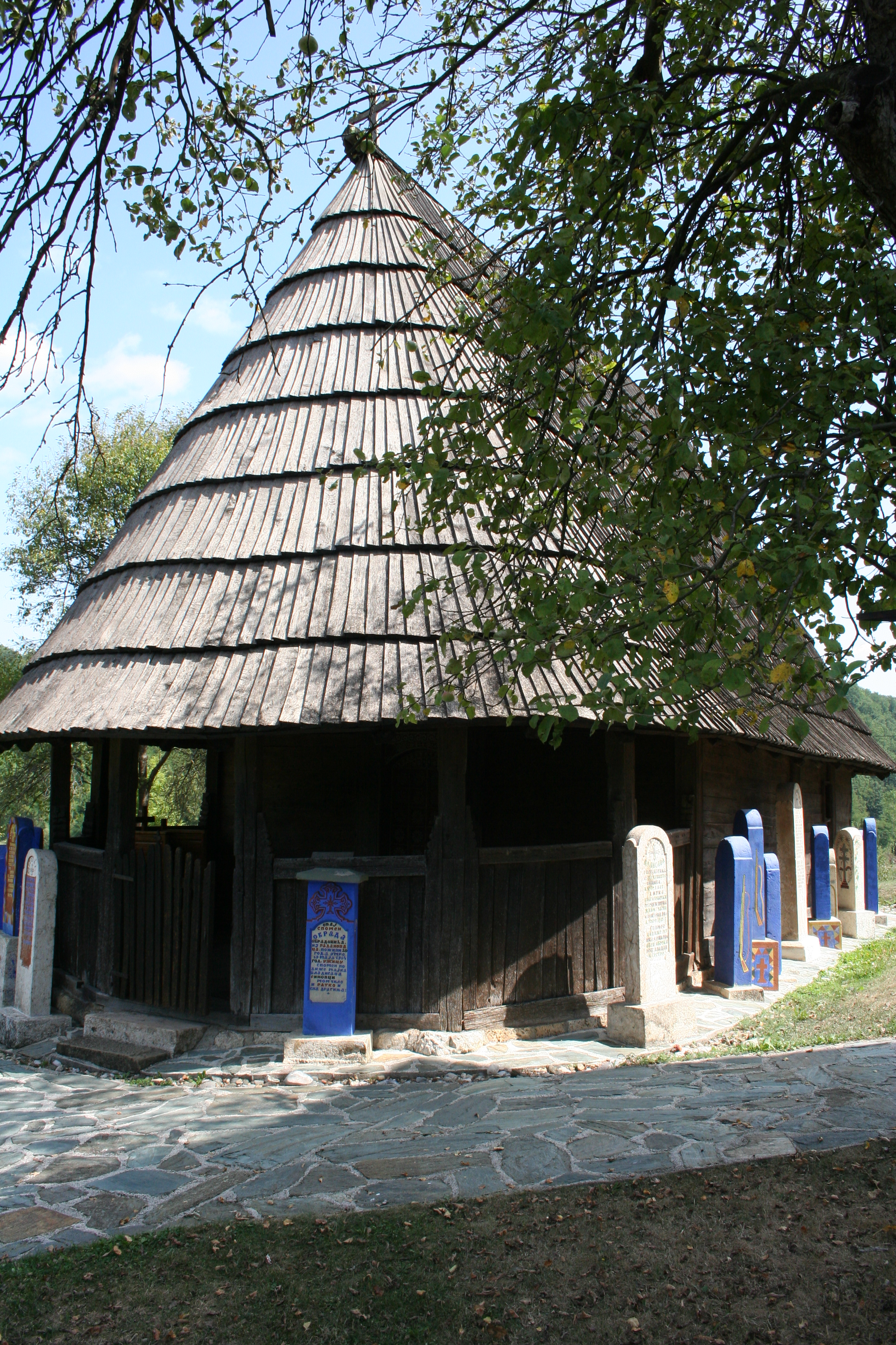 Crkva brvnara Seča Reka